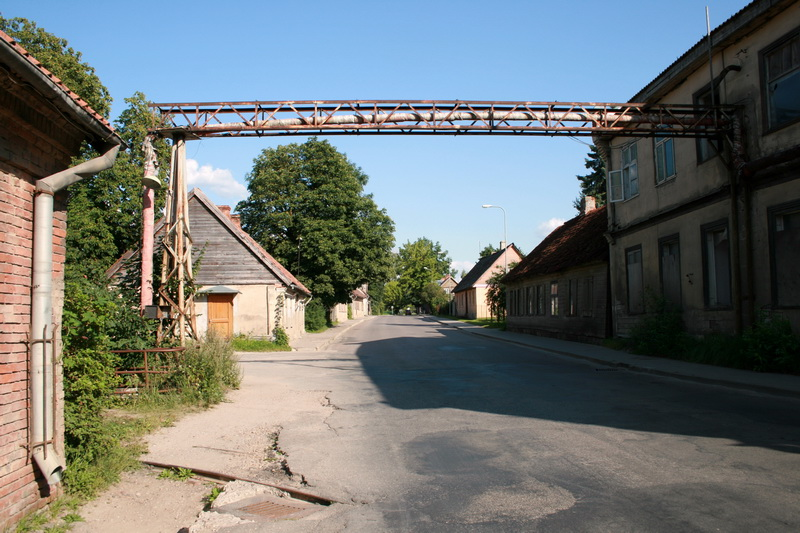 Jelgavas iela bijušās fabrikas "Vulkāns" teritorijā (autoceļš P116)